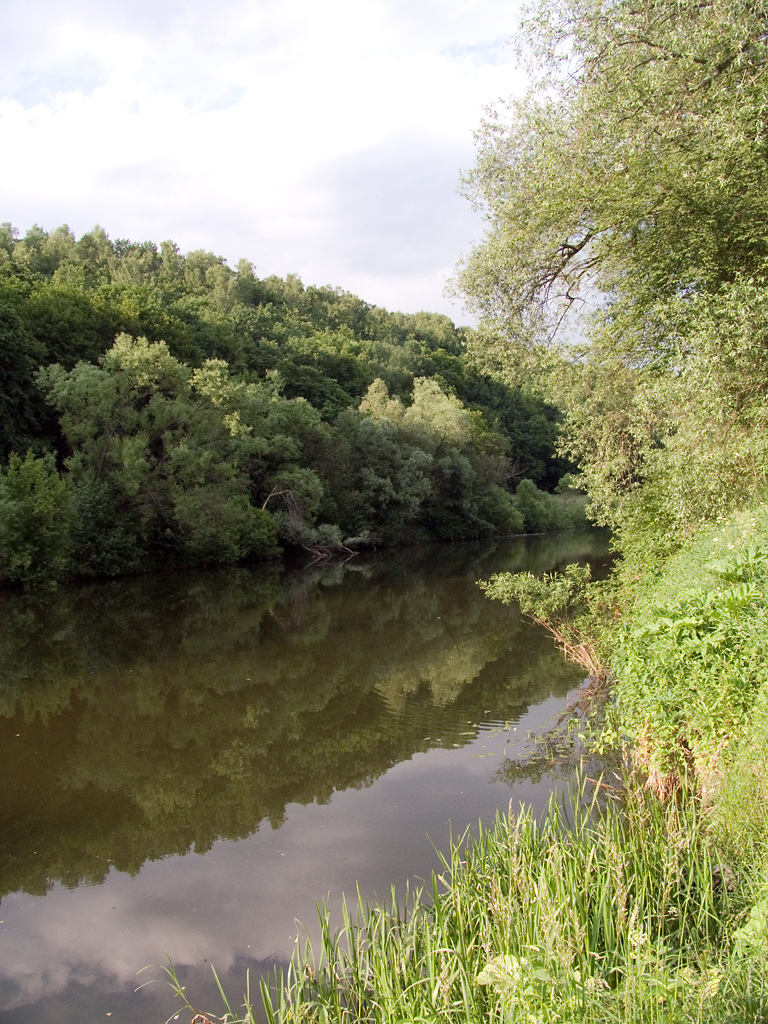 Osiotr_river, Russia